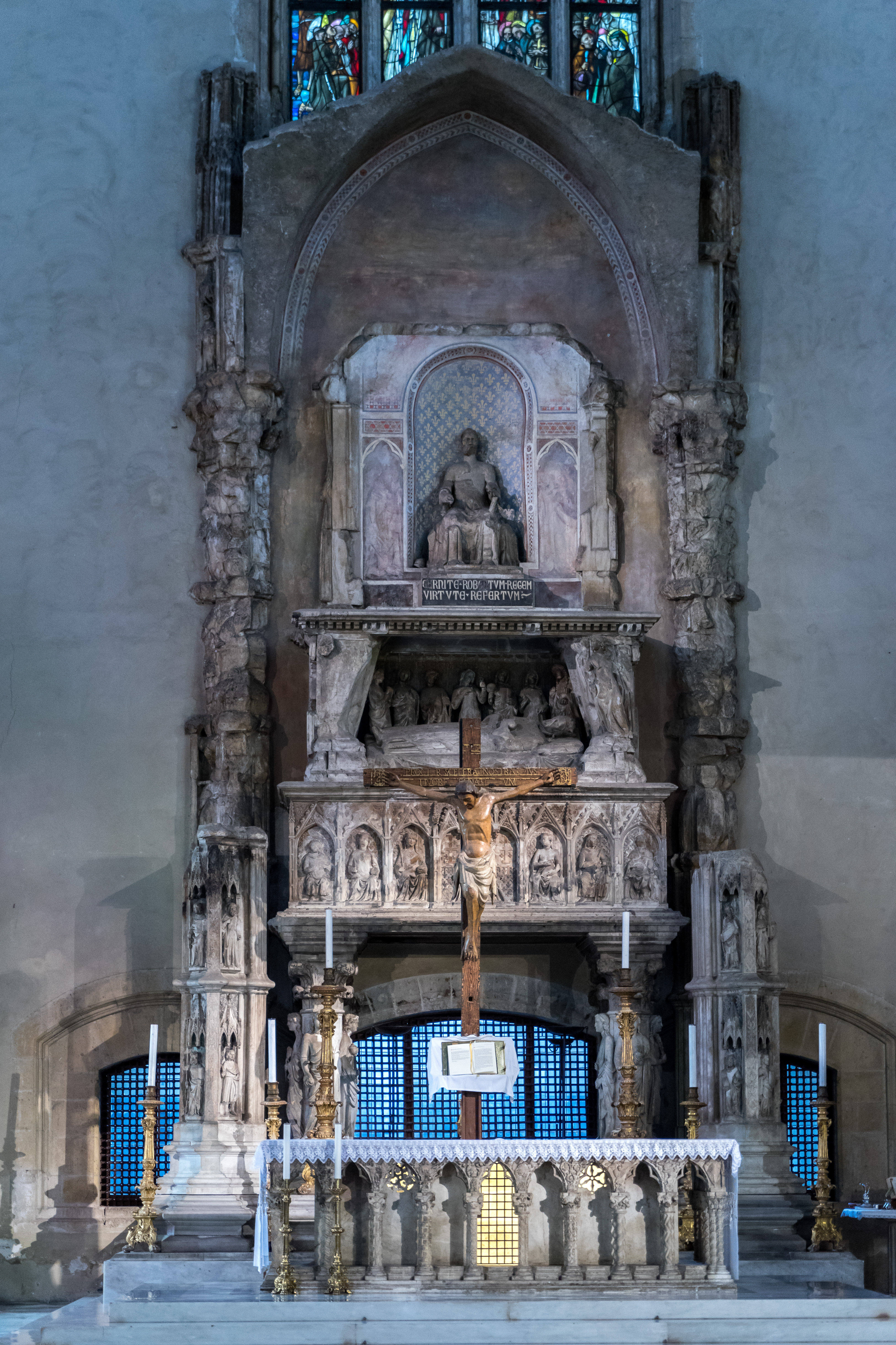 Naples - Santa Chiara - Autel et tombe de Robert de Naples